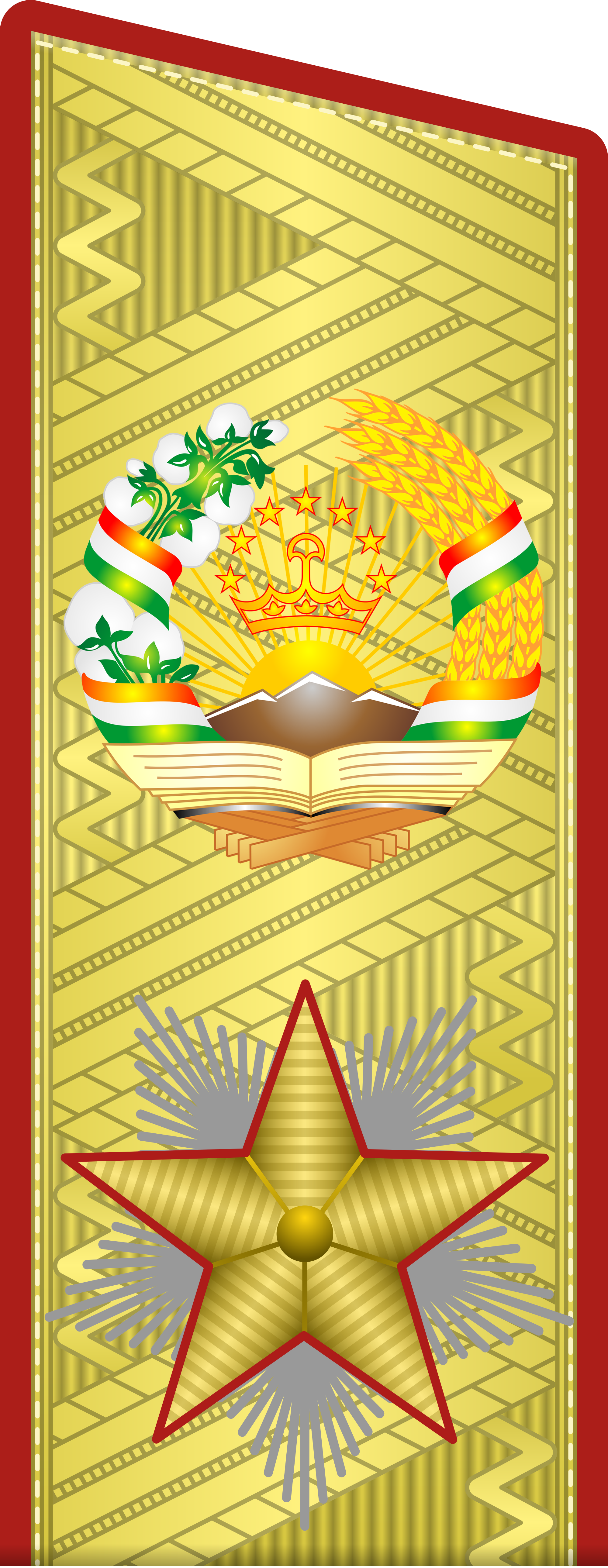 Тоҷикӣ: Сардӯшии ҷашнии Артишсолор дар Нерӯҳои мусаллаҳи Тоҷикистон